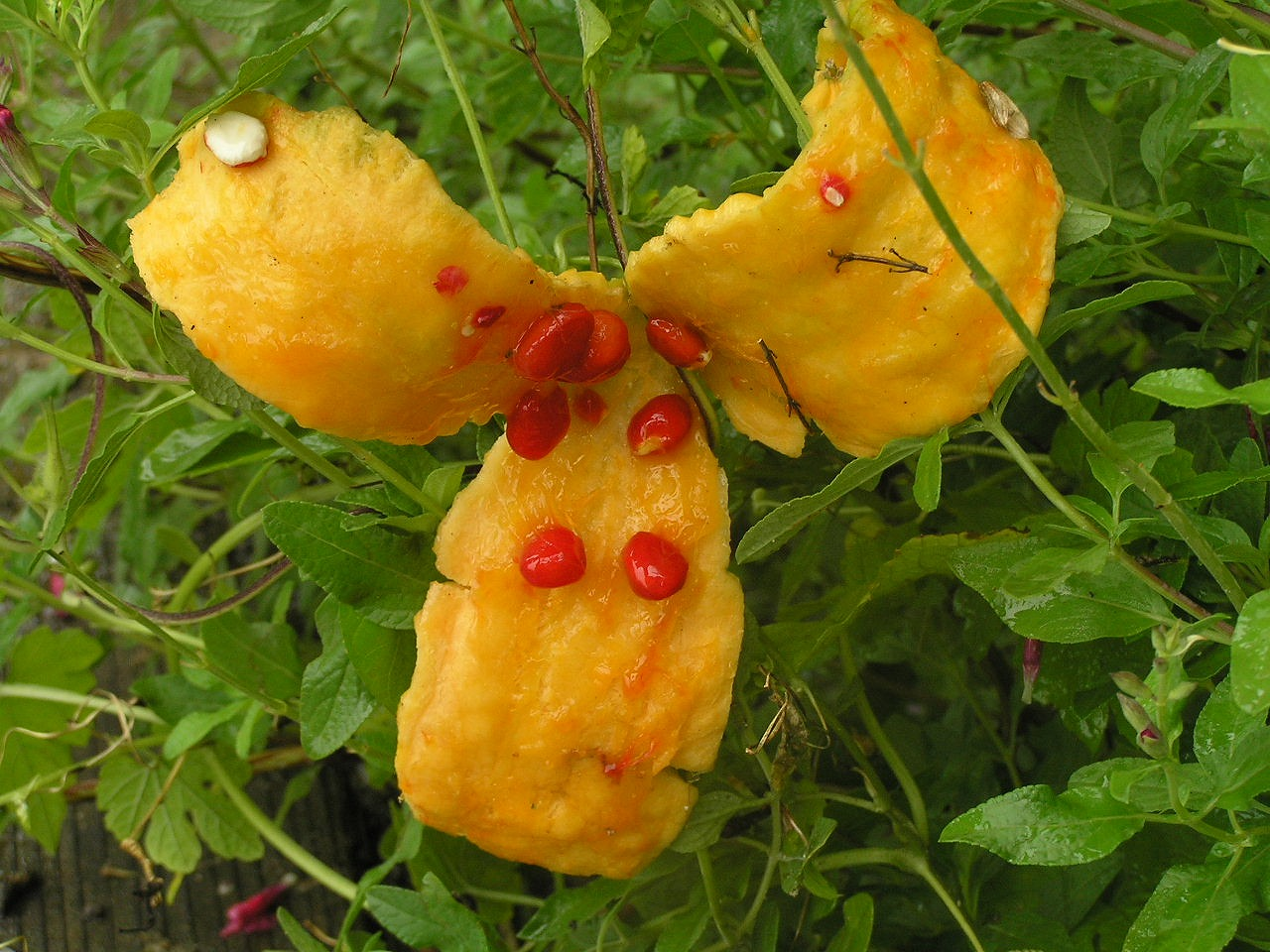 ニガウリの変態 Bân-lâm-gú: Khóo-kue lāi-té ê tsí. 苦瓜內底的子。